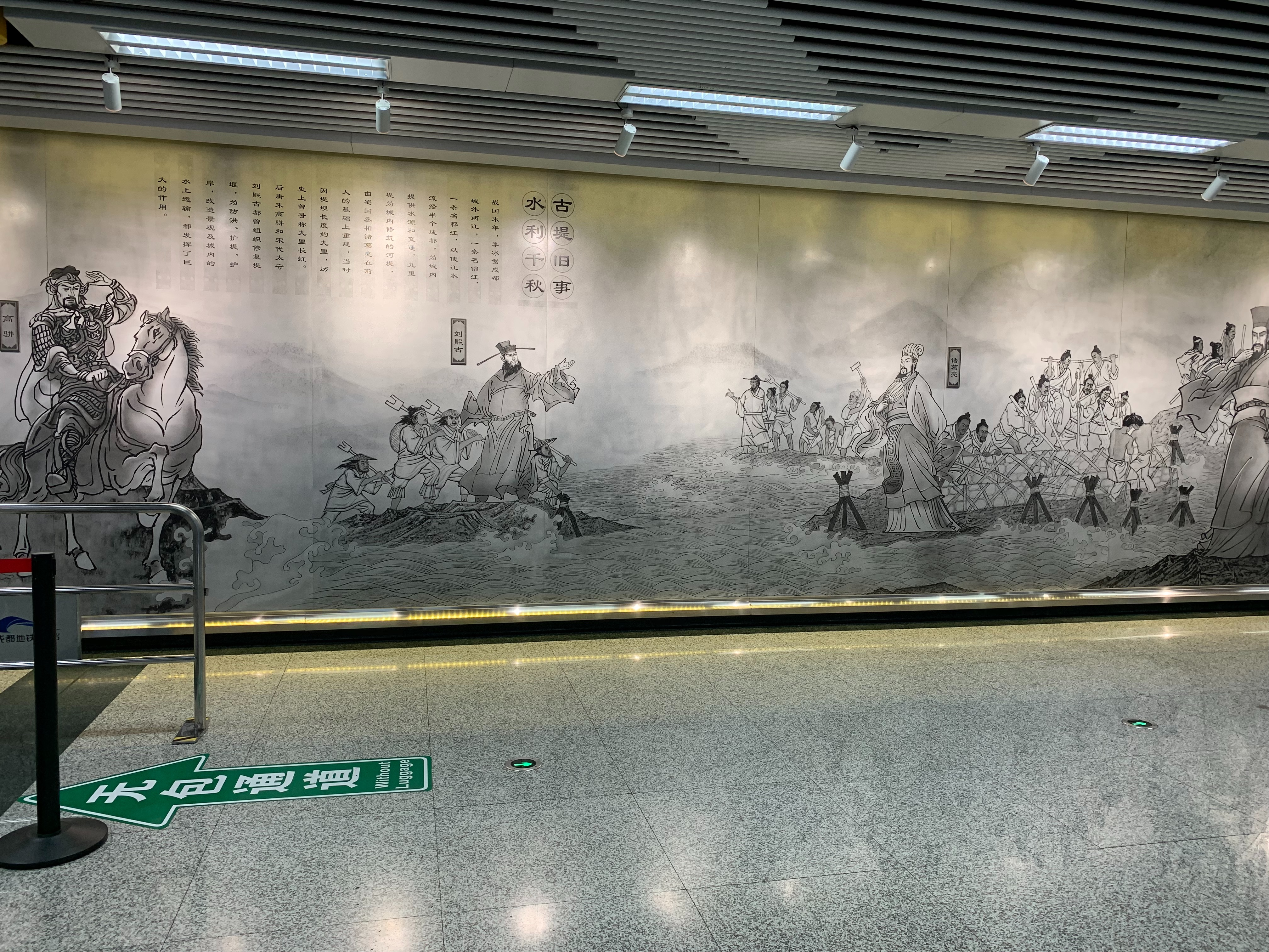 成都地铁九里堤站